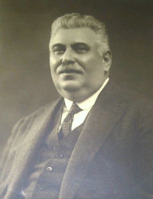 Carlos Díaz Vélez